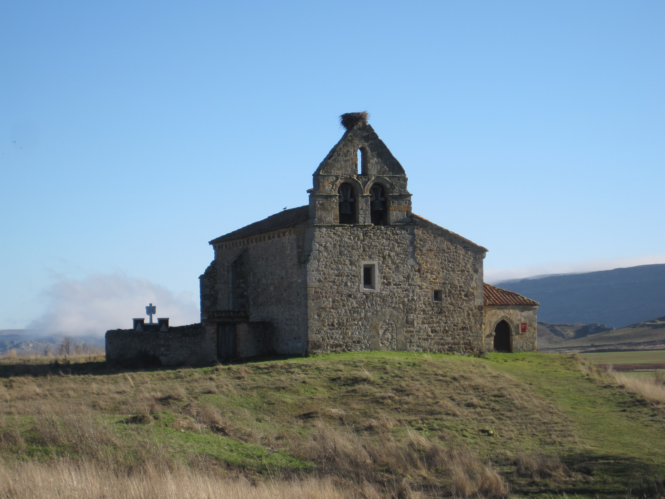 Vista de la iglesia Santa María de Puentetoma (Aguilar de Campoo, Palencia, España).